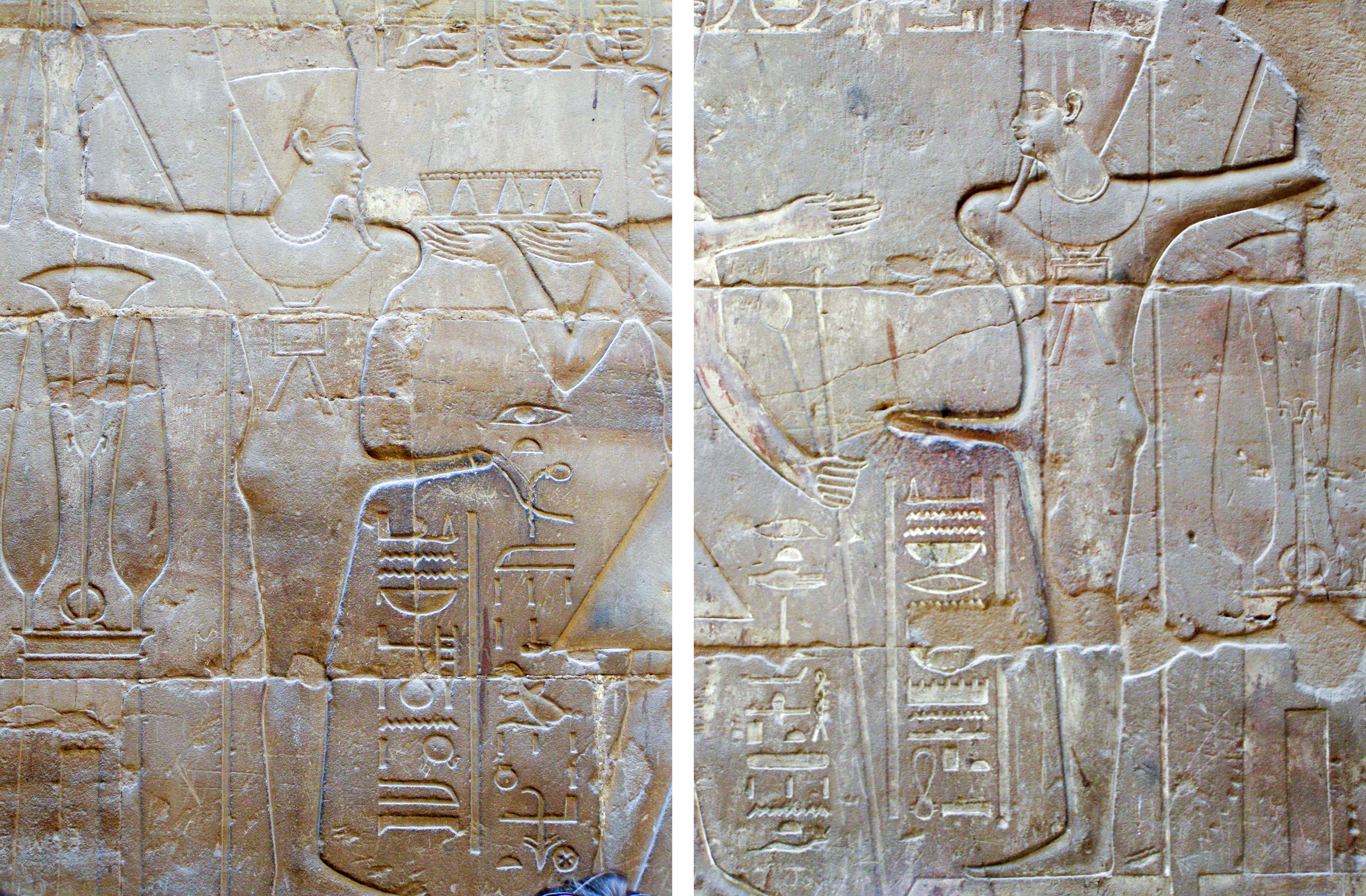 Amon-Min est un dieu représenté en érection, le phallus horizontal - Temple d'Amon (Thèbes) - Louxor - Egypte